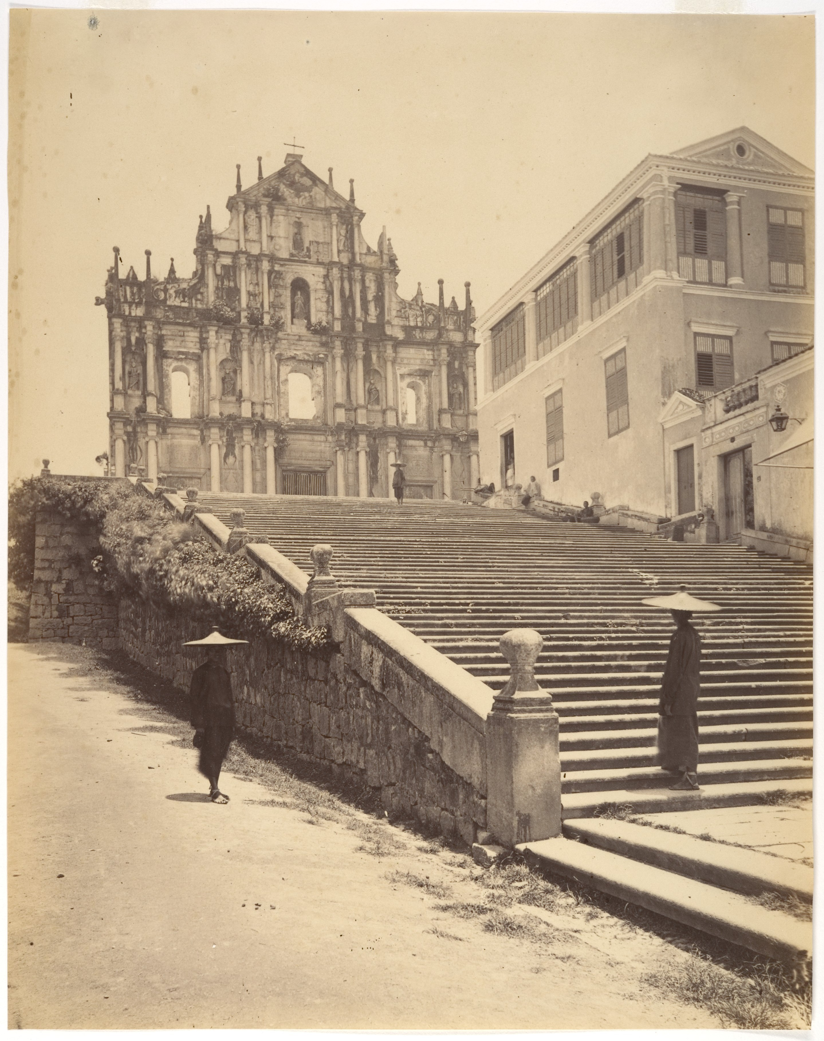 澳門大三巴牌坊。